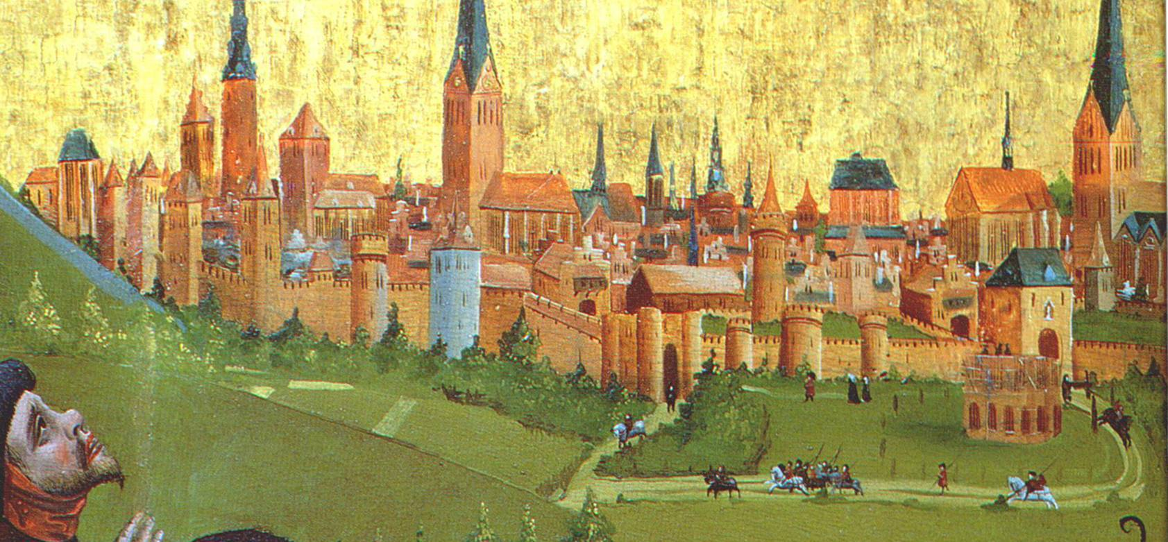 Heiligentaler Altar Detail: Tafel: Aegeas verfällt dem Wahnsinn und stirbt - im Hintergrund: älteste Darstellung Lüneburgs